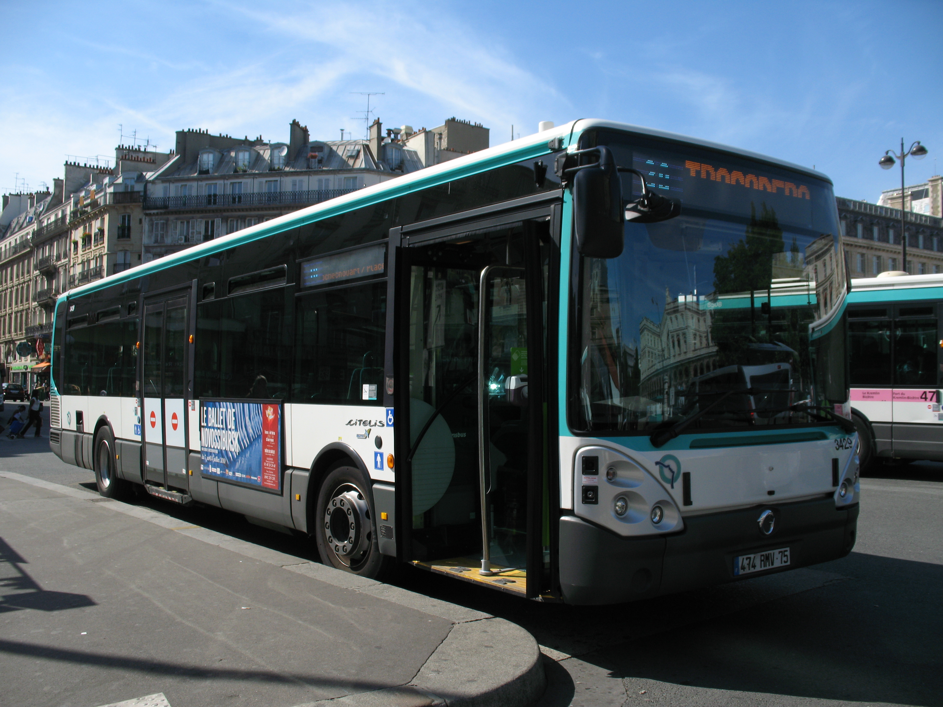 Bus RATP ligne 30 à Gare de l'Est - Irisbus Citelis Line